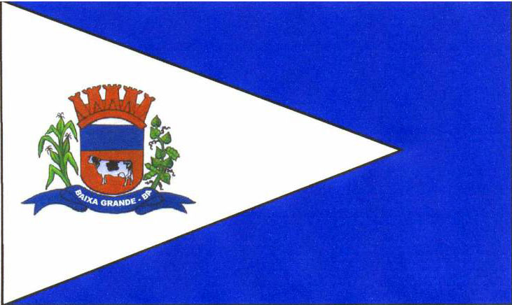 Bandeira Baixa Grande